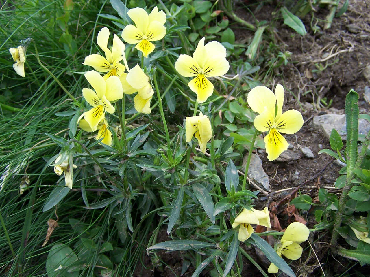 Viola lutea subsp. sudetica (pl. fiołek żółty sudecki), habitat: Tatra Mountains, Goryczkowa Czuba